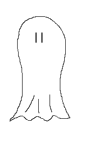 spöke, image by alers.